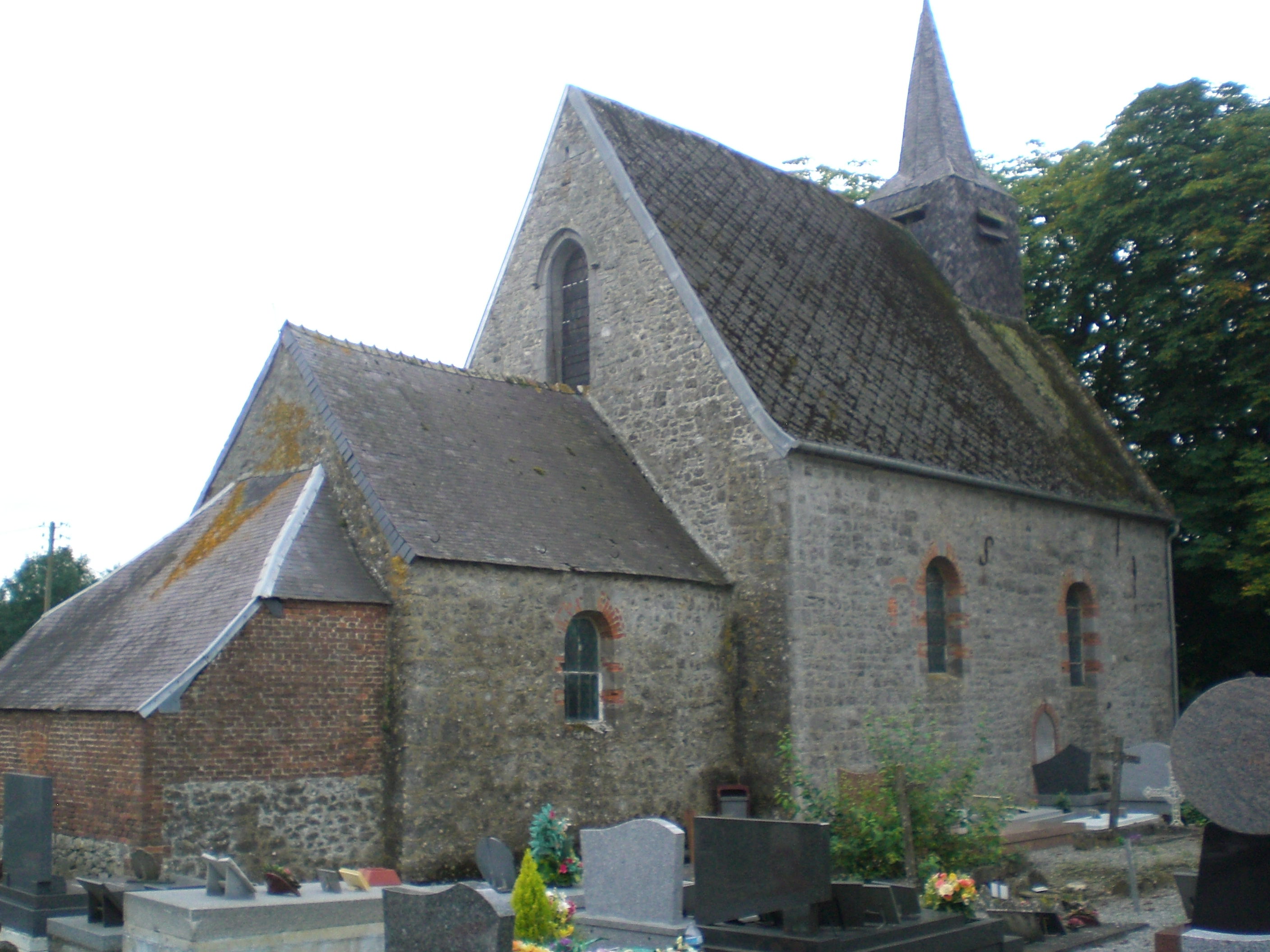 eglise de floursies